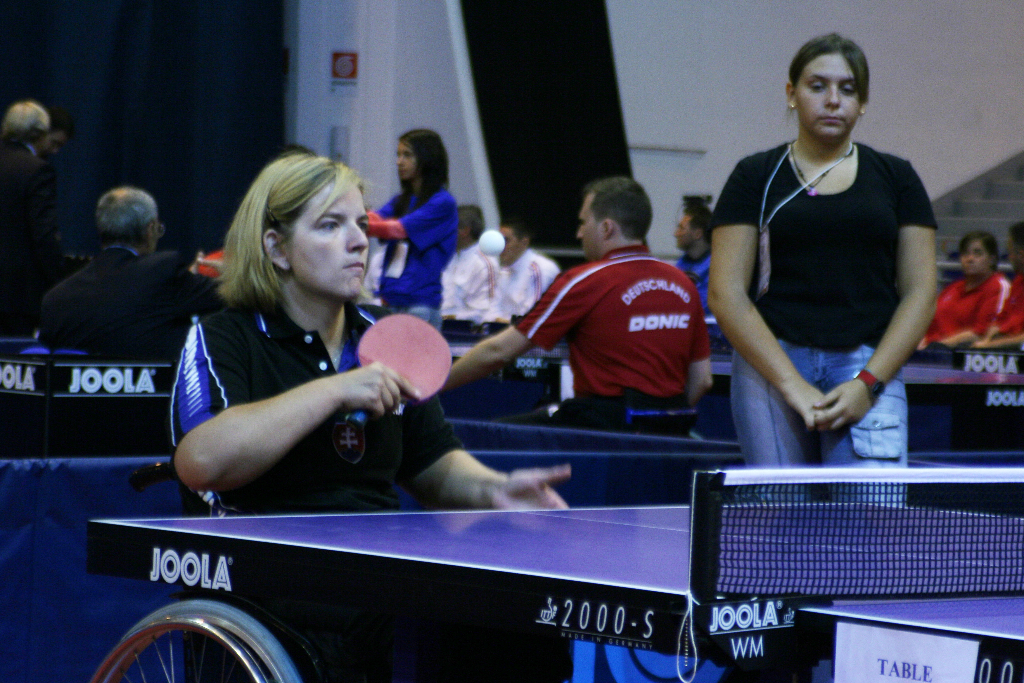 Alena Kánová, držiteľka zlatej medaily v stolnom tenise z letných paralympijských hier Sydney 2000Alena Kanova (Slovakia)